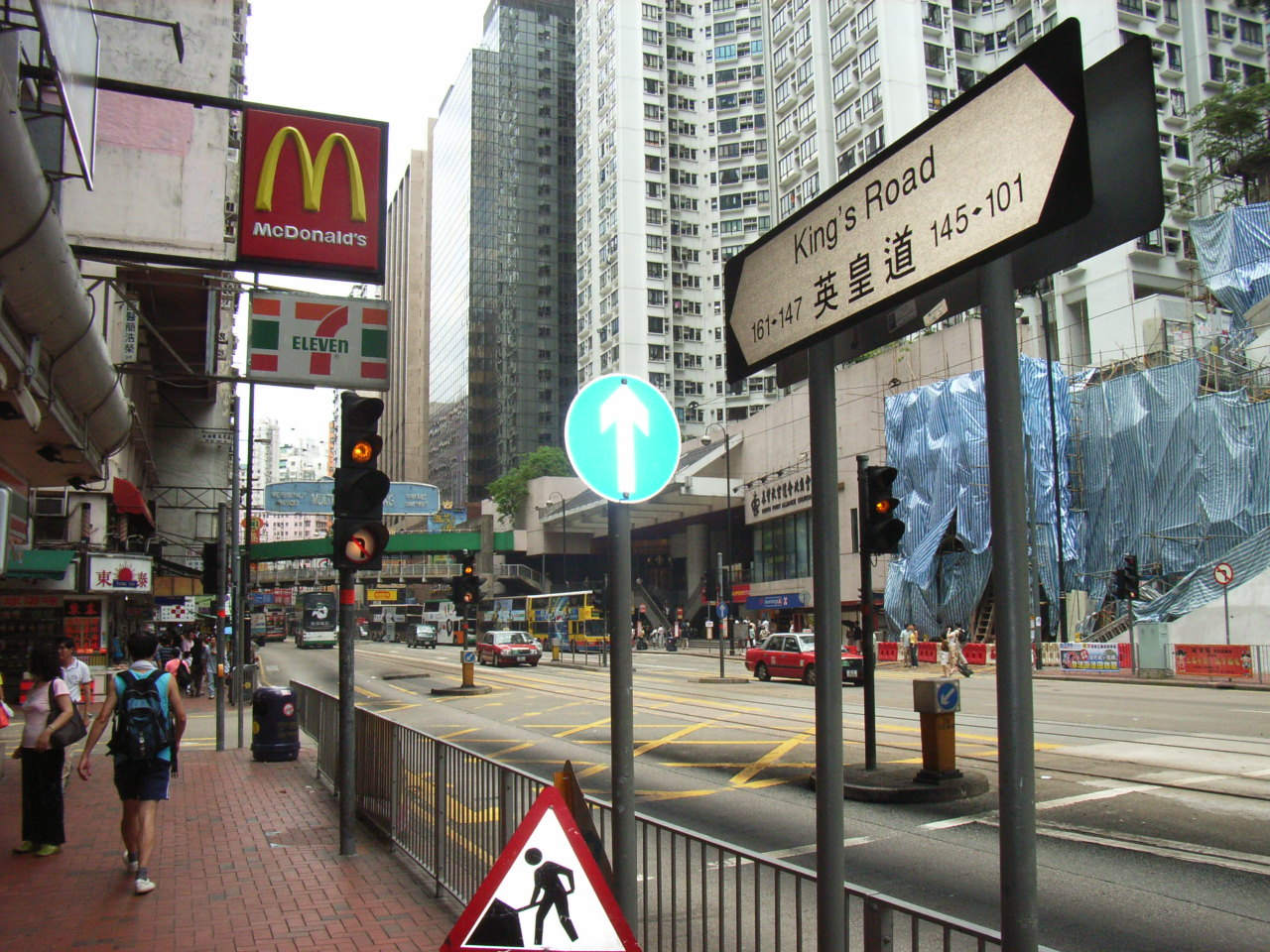 英皇道是香港東區的一條主要道路，由銅鑼灣天后開始，經北角到達西灣河的西部 Author: BEVERLYSHEN